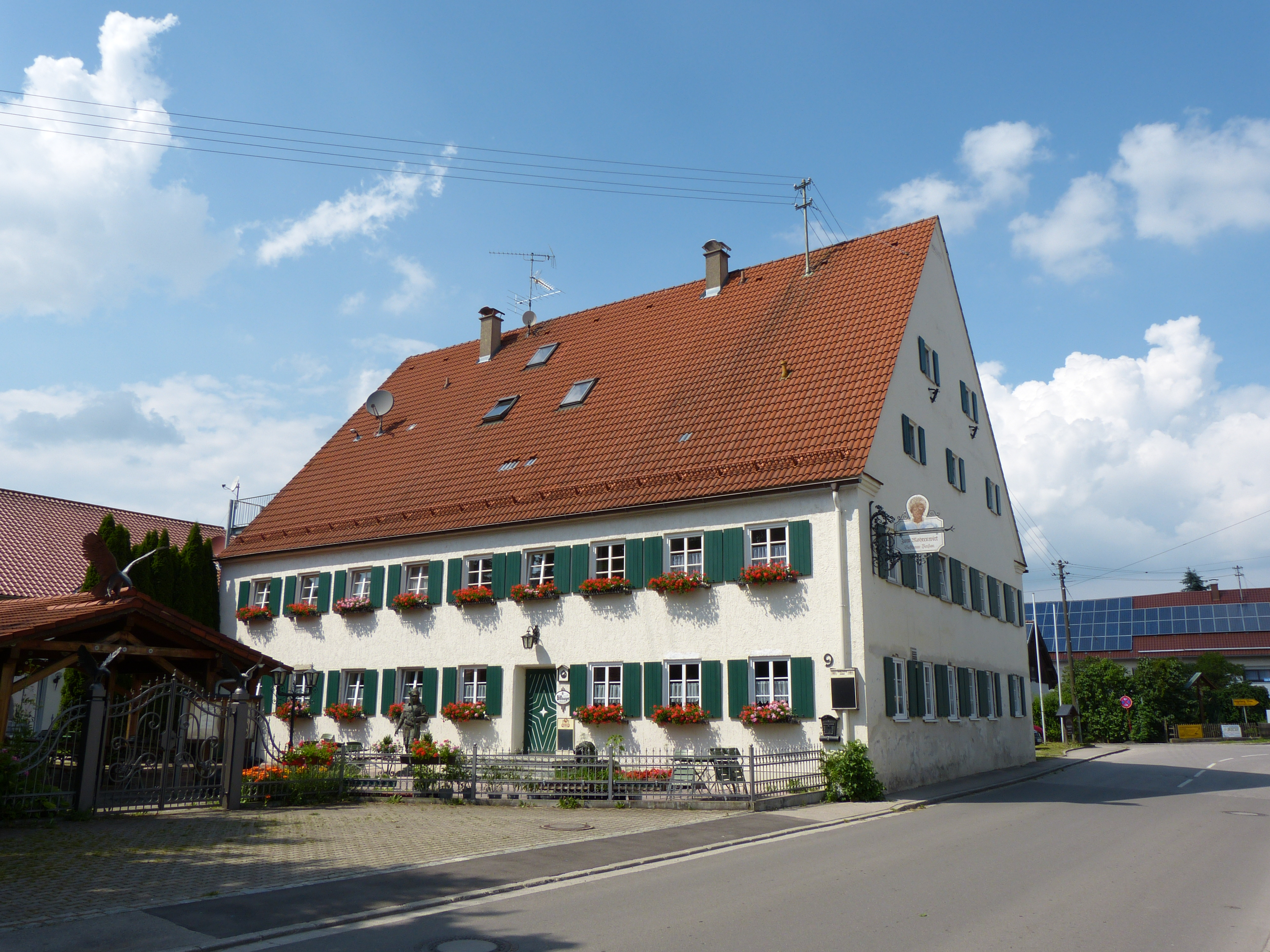 Gasthof zum Mohren, Siebnach bei Ettringen, Landkreis Unterallgäu, Bayern, Deutschland